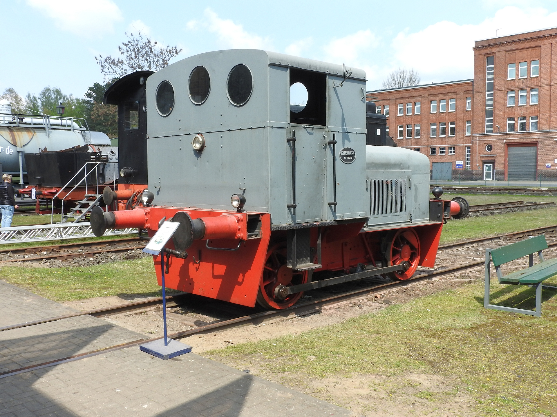 Deutz OMZ122R, Lokpark Braunschweig, 01.05.2016